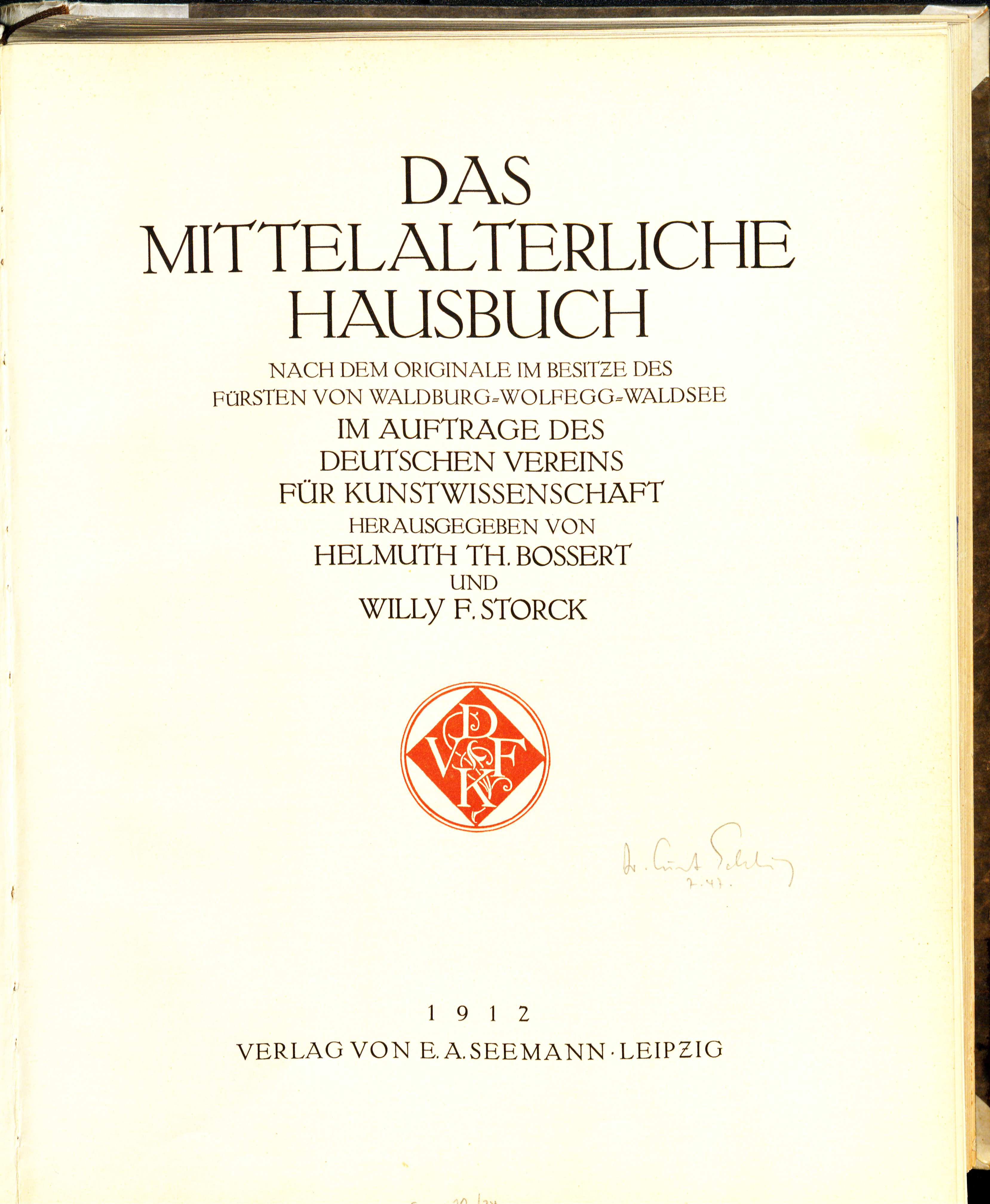 Helmuth Th. Bossert, Willy F. Storck (Hrsg.): Das mittelalterliche Hausbuch nach dem Originale im Besitze des Fürsten von Waldburg–Wolfegg–Waldsee im Auftrage des deutschen Vereins für Kunstwissenschaft. Seemann, Leipzig 1912 Titelblatt